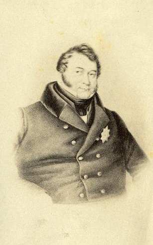 Eestimaa rüütelkonna peamees Paul von Benckendorff (1784-1841)